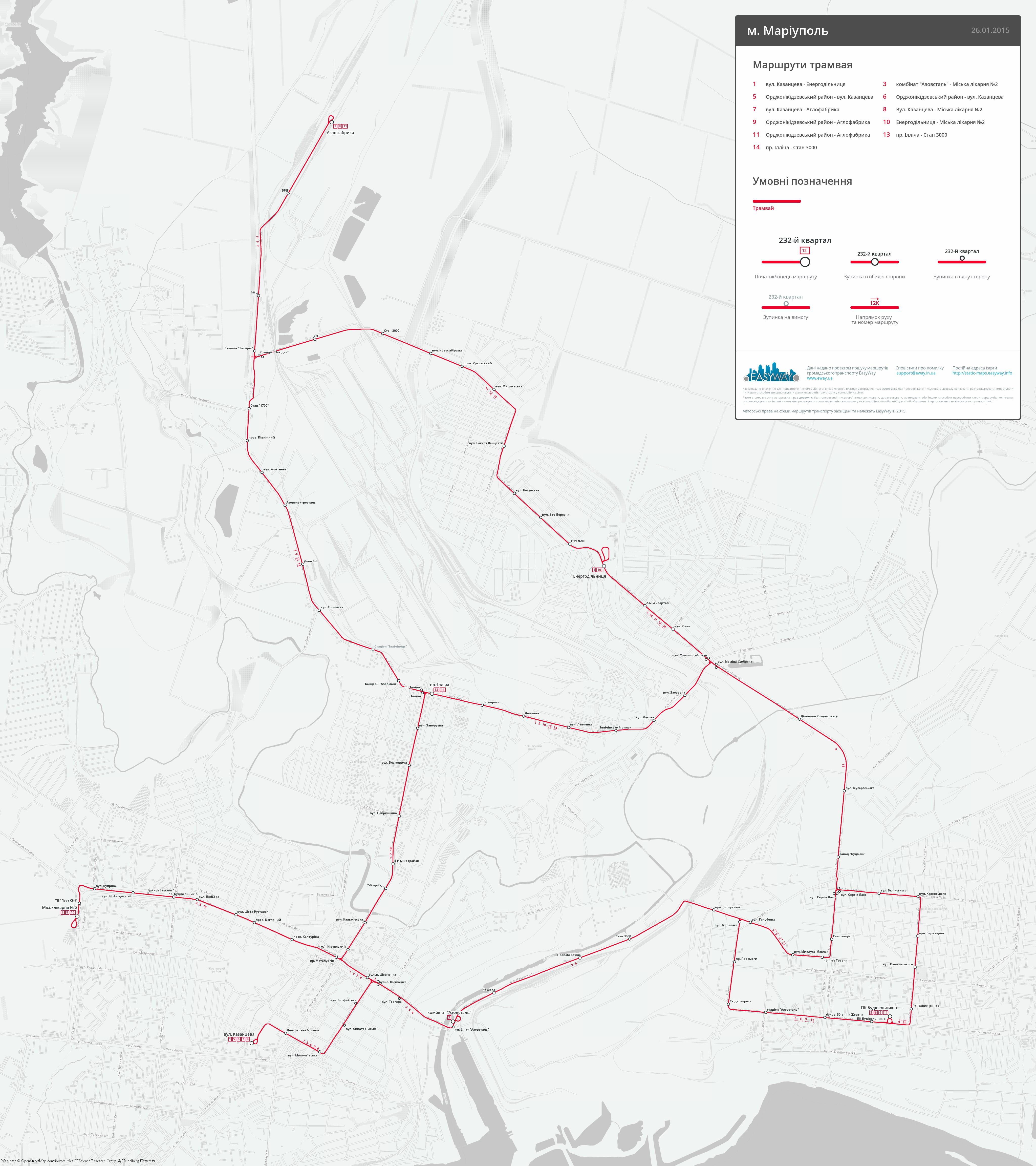 Схема трамвайних маршрутів у місті Маріуполь